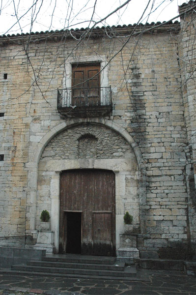 Façana de Santa Maria de Camprodon